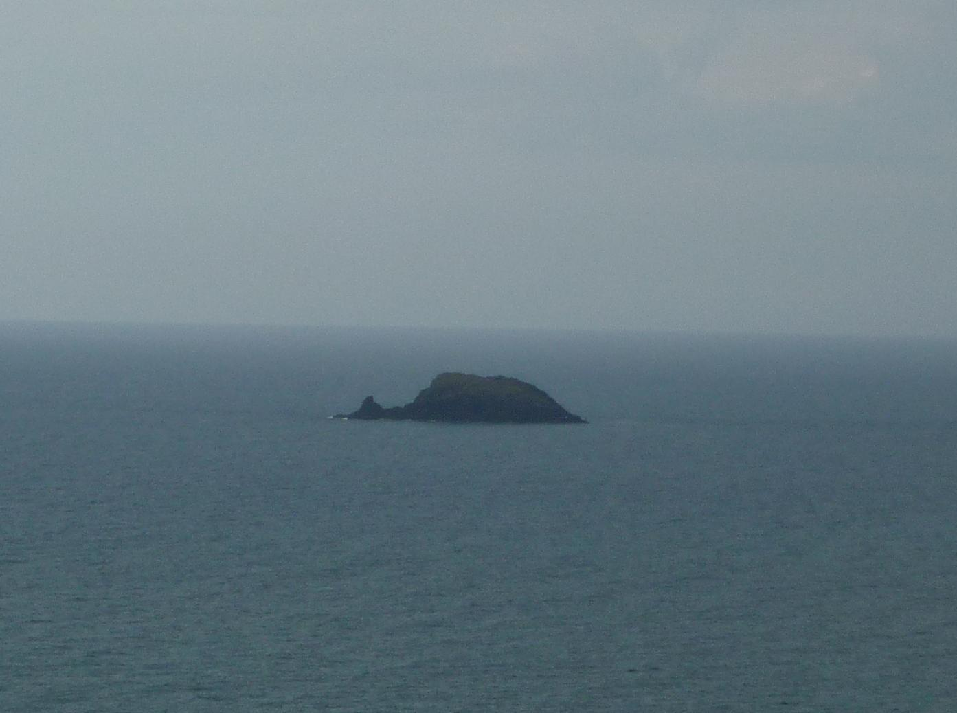 海士島 鳥取砂丘から撮影